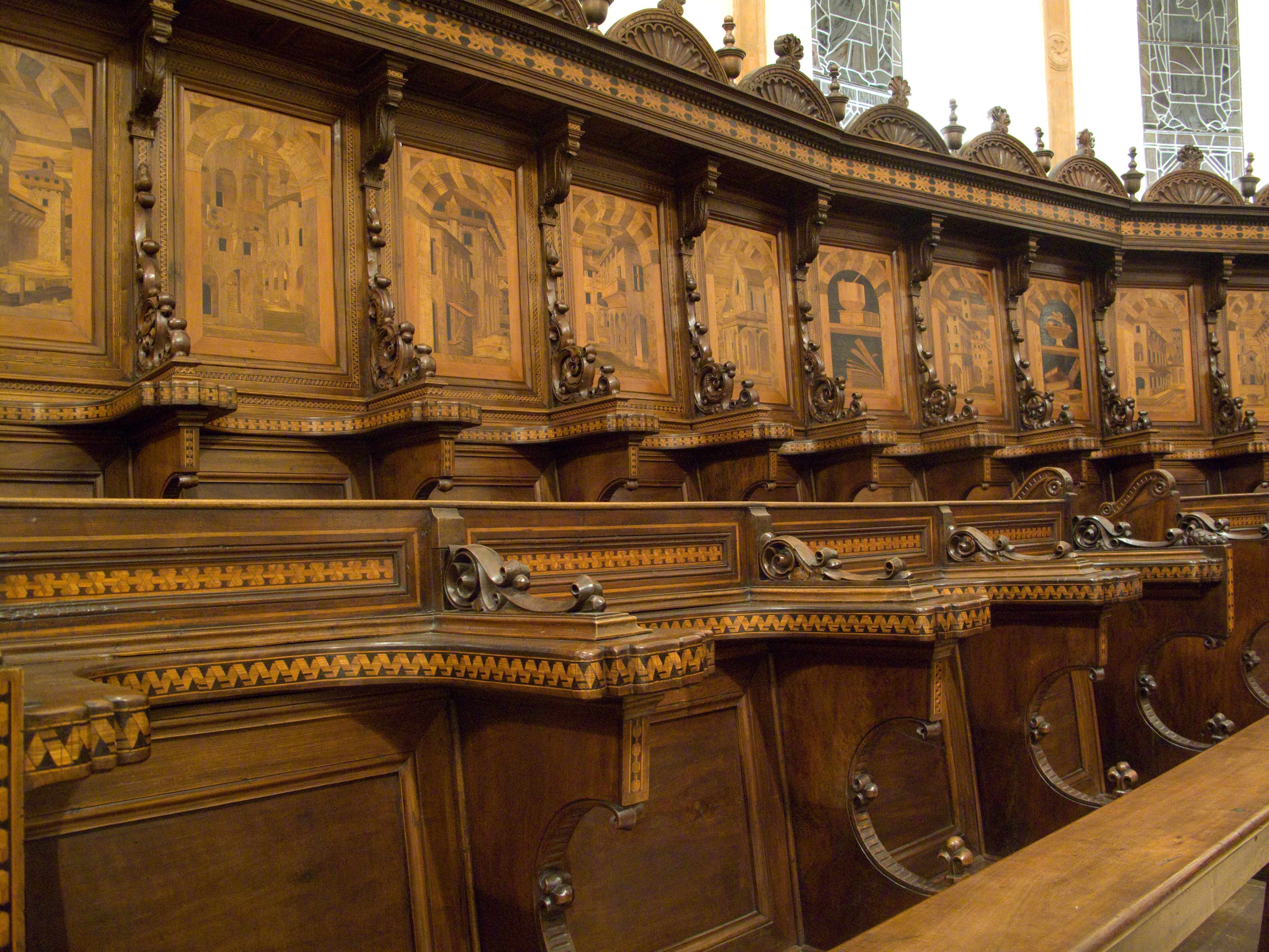 Vicenza - Chiesa di Santa Corona - Coro